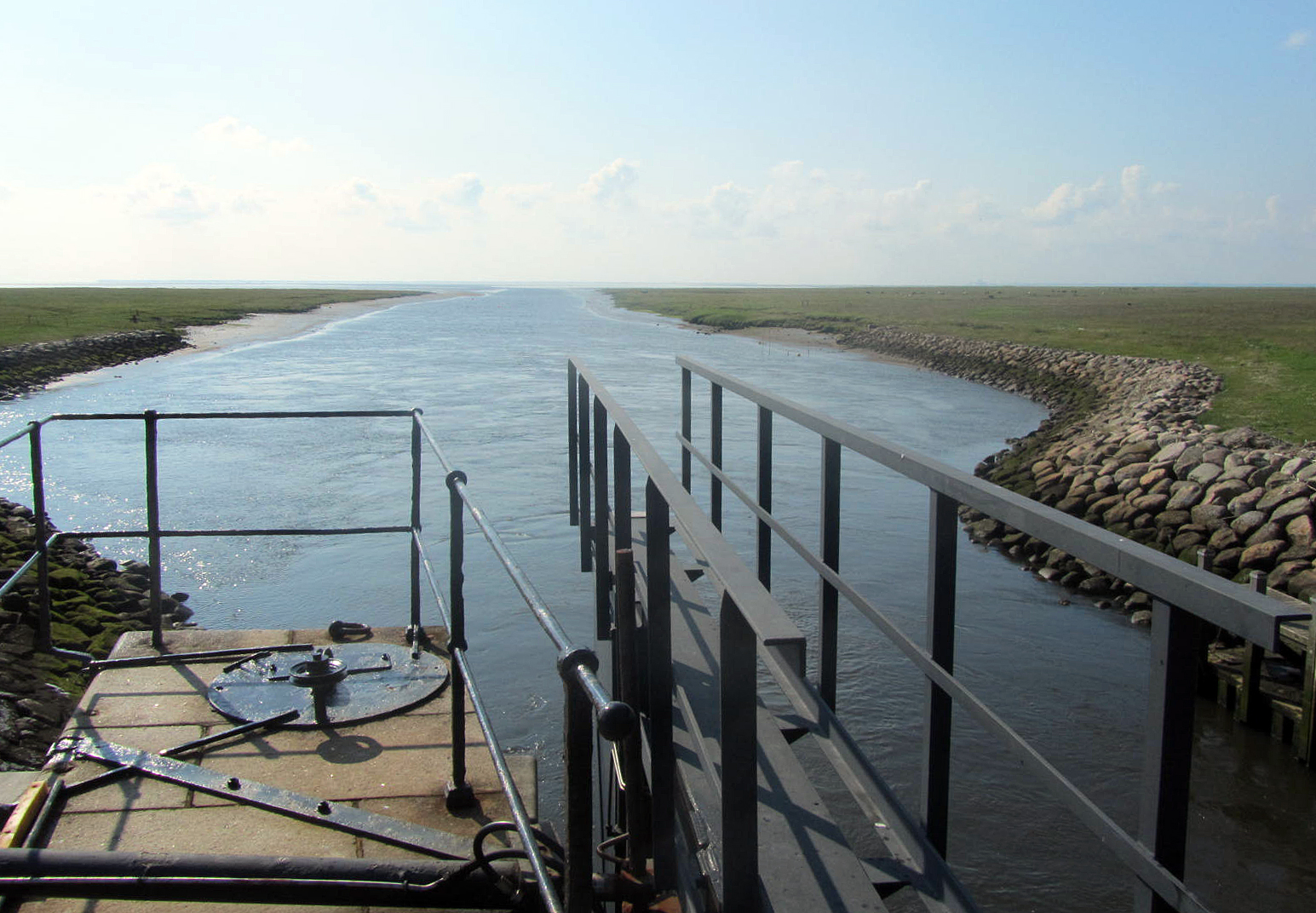 Ribe Ås udløb set mod havet set fra Kammerslusen